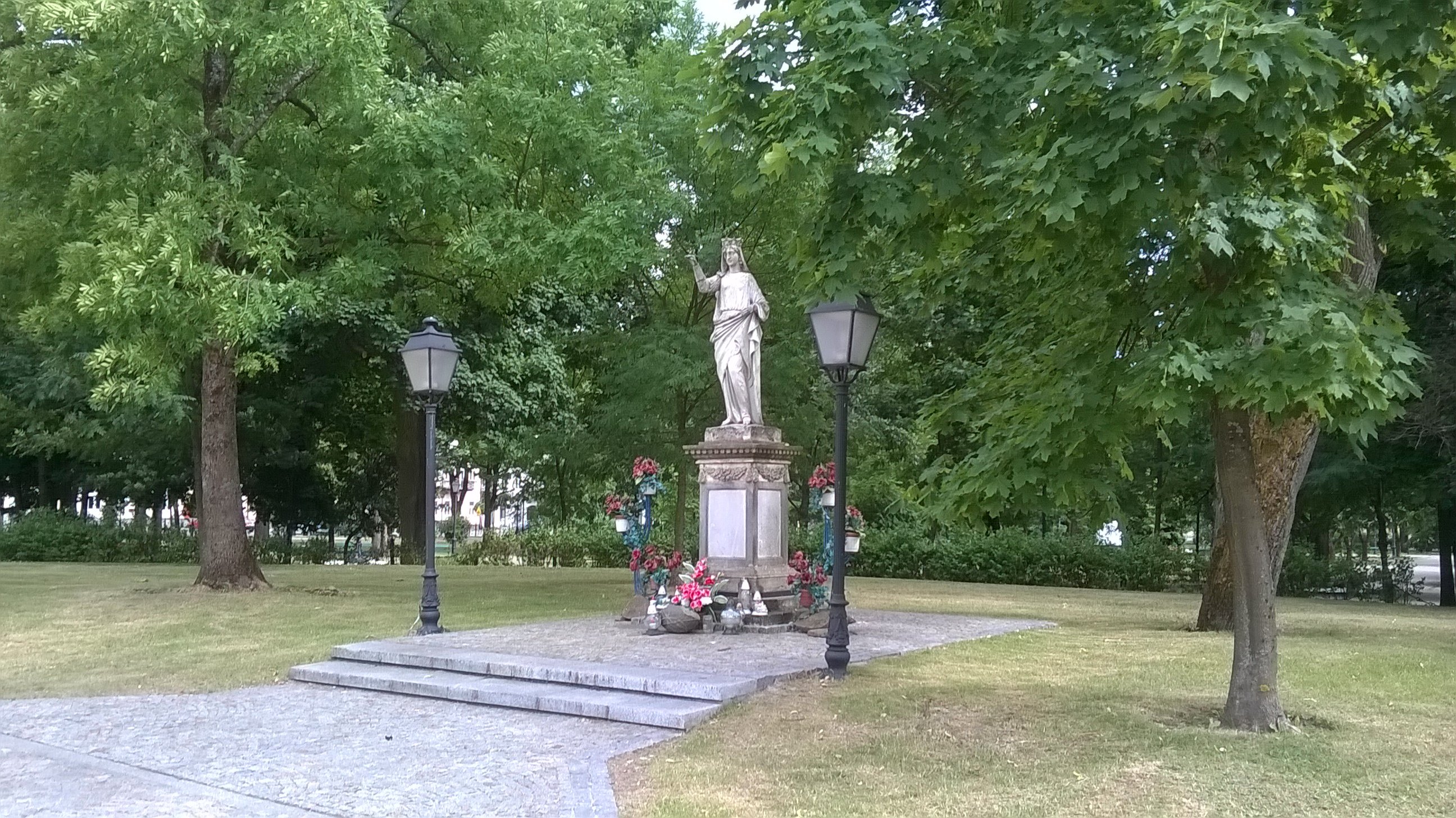 Suwałki - statua Matki Boskiej (niektóre źródła podają: figura św. Jadwigi) znajdująca się w północnej części Parku im. Konstytucji 3 Maja.